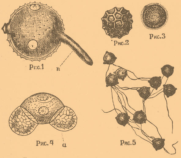 Иллюстрация к статье Экзина из энциклопедии Брокгауза и Ефрона